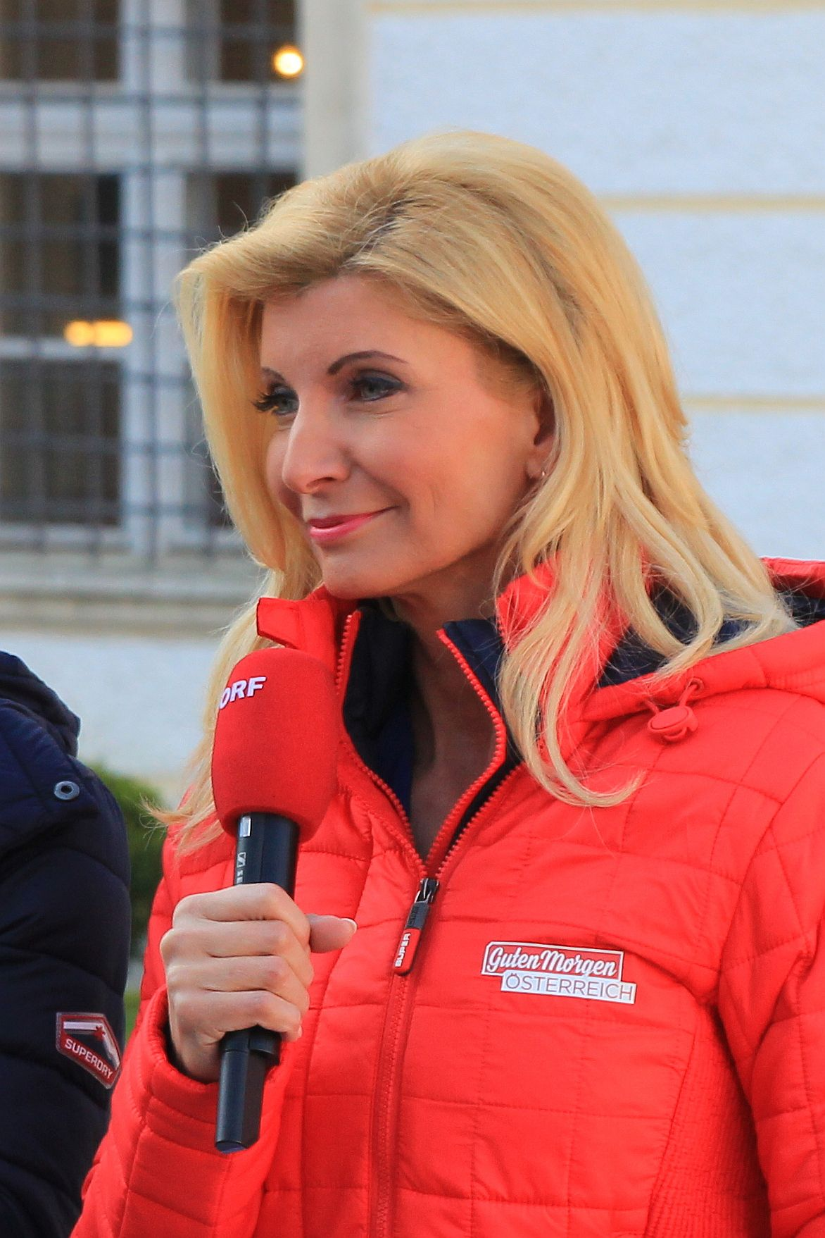 Nadja Mader, Moderatorin von ORF NÖ Cropped aus File:Guten-Morgen-Heiligenkreuz 3321.JPG